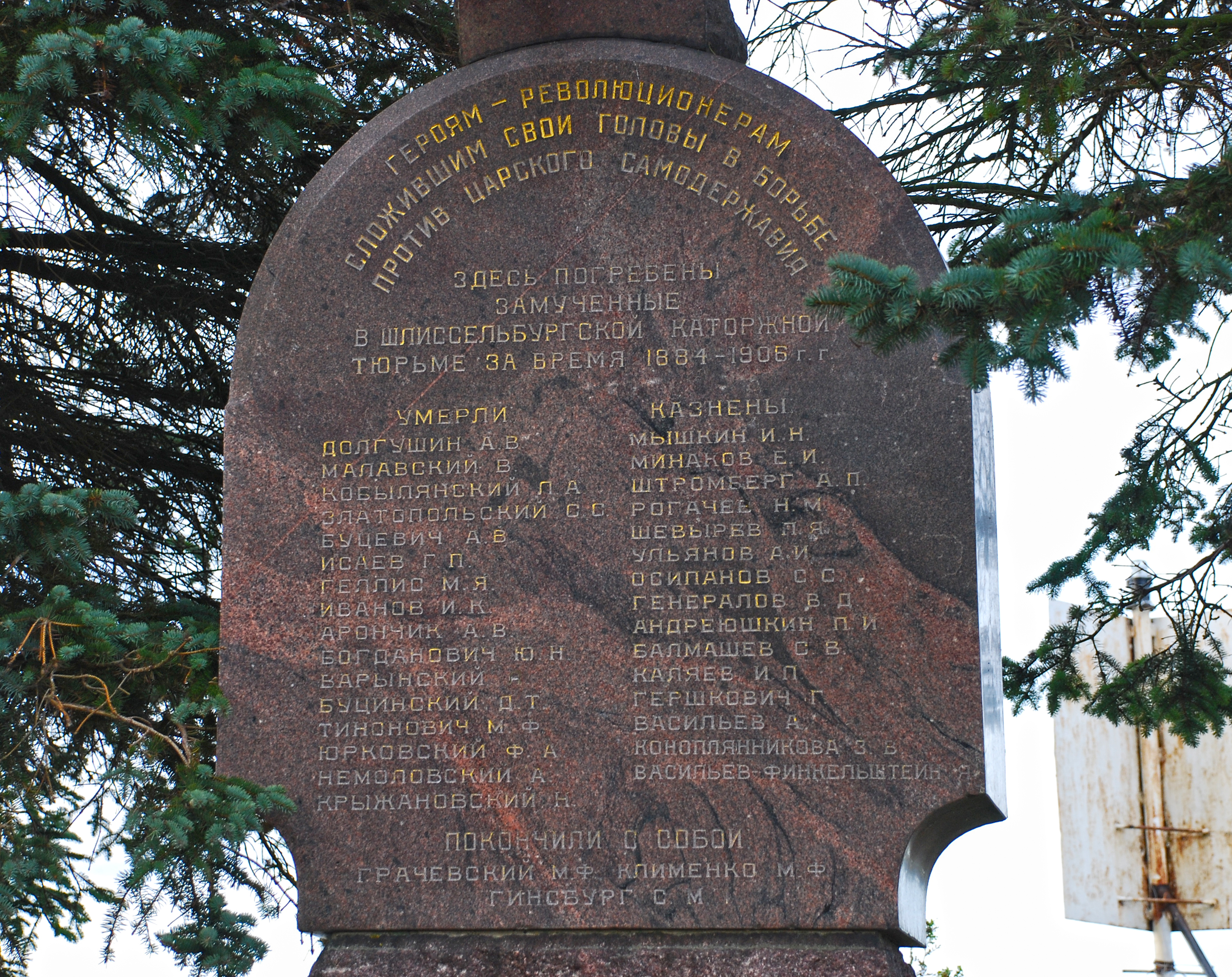 Могила А.И. Ульянова (1866-1887) (Лен.область, Шлиссельбург, г.Петрокрепость, Шлиссельбургская крепость)